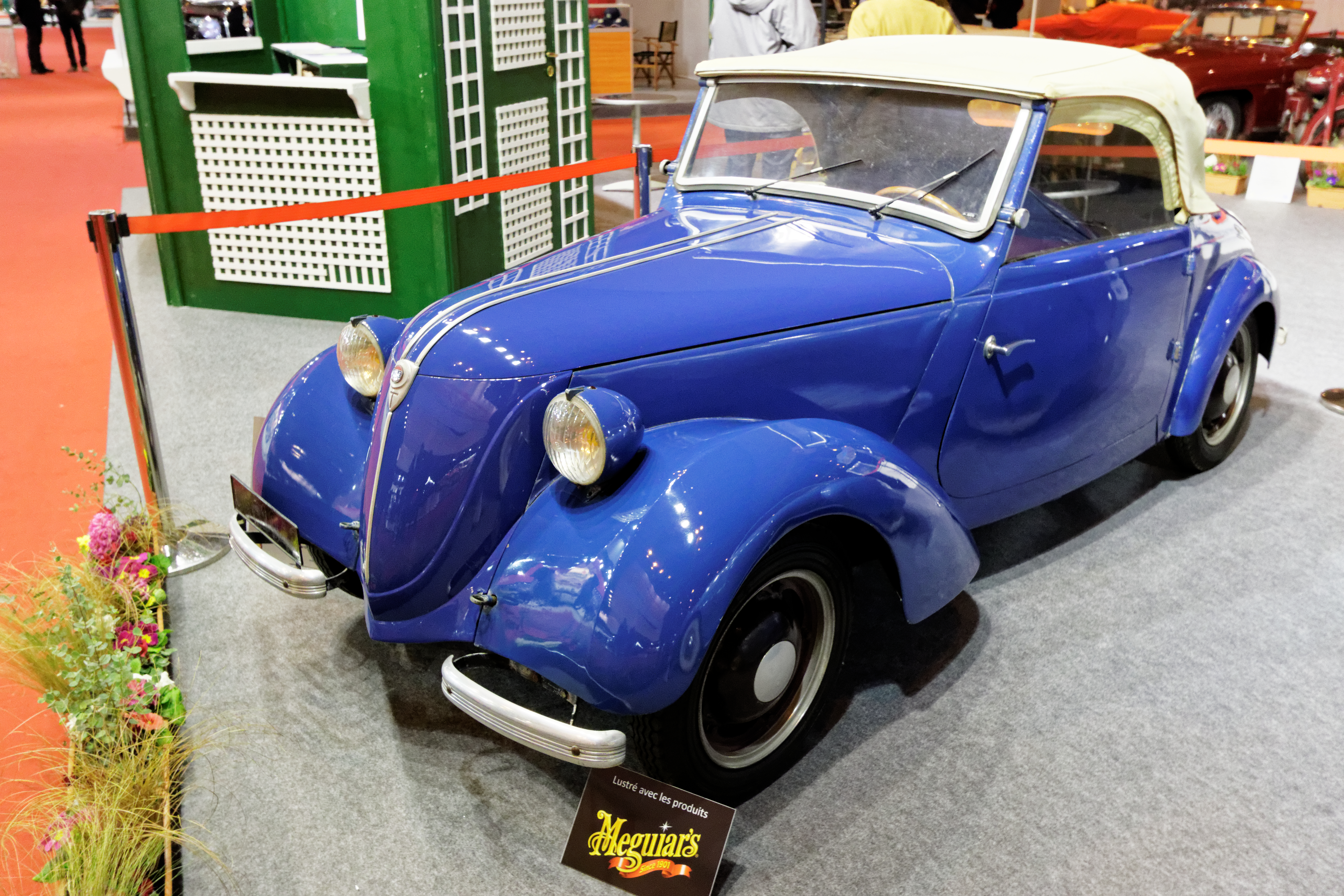 Une des voiture présentée lors du salon Rétromobile de Paris 2015